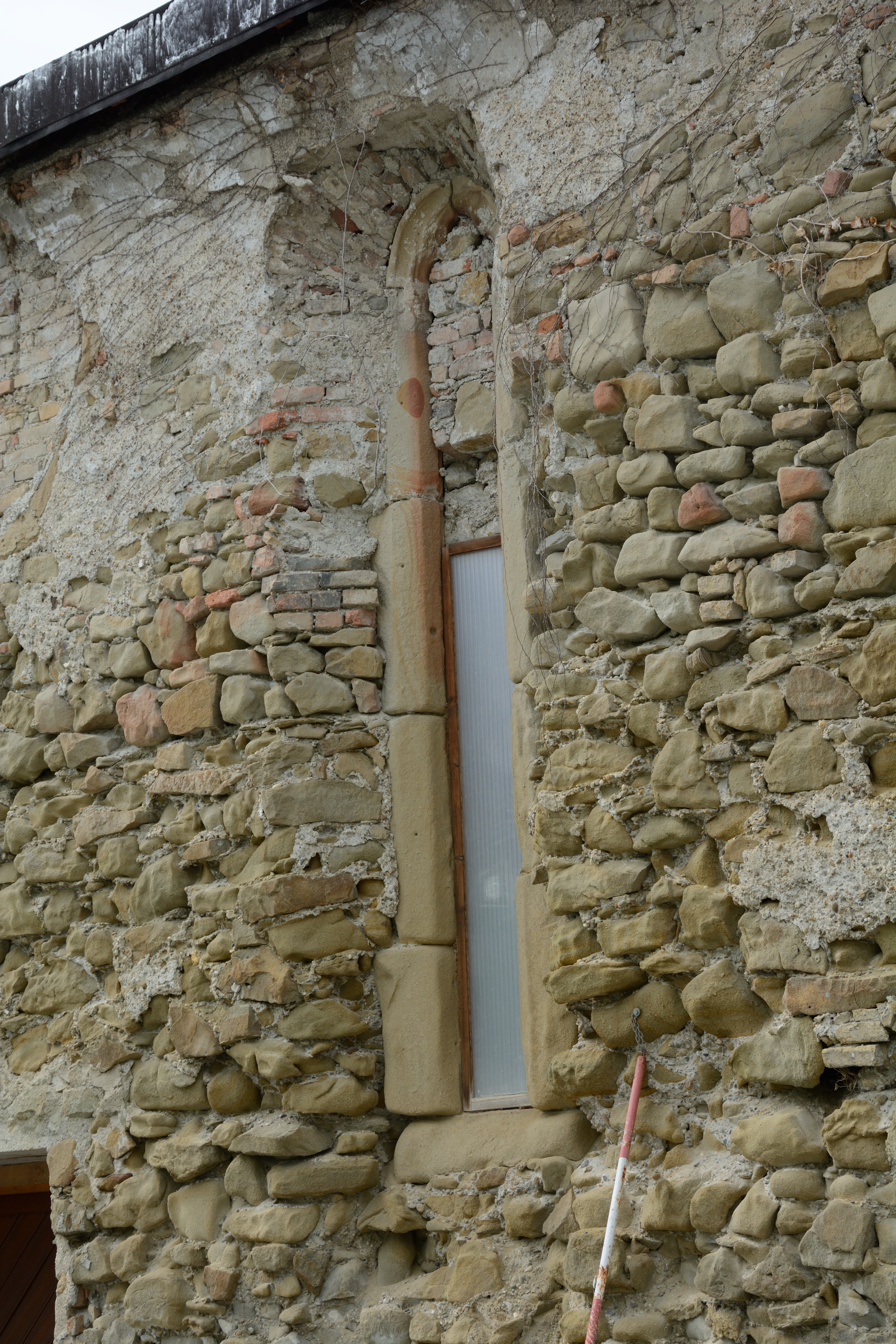 Mauerzüge d. ehem. Synagoge Roßmühle